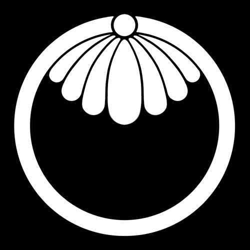 「釻菊」紋（染抜）